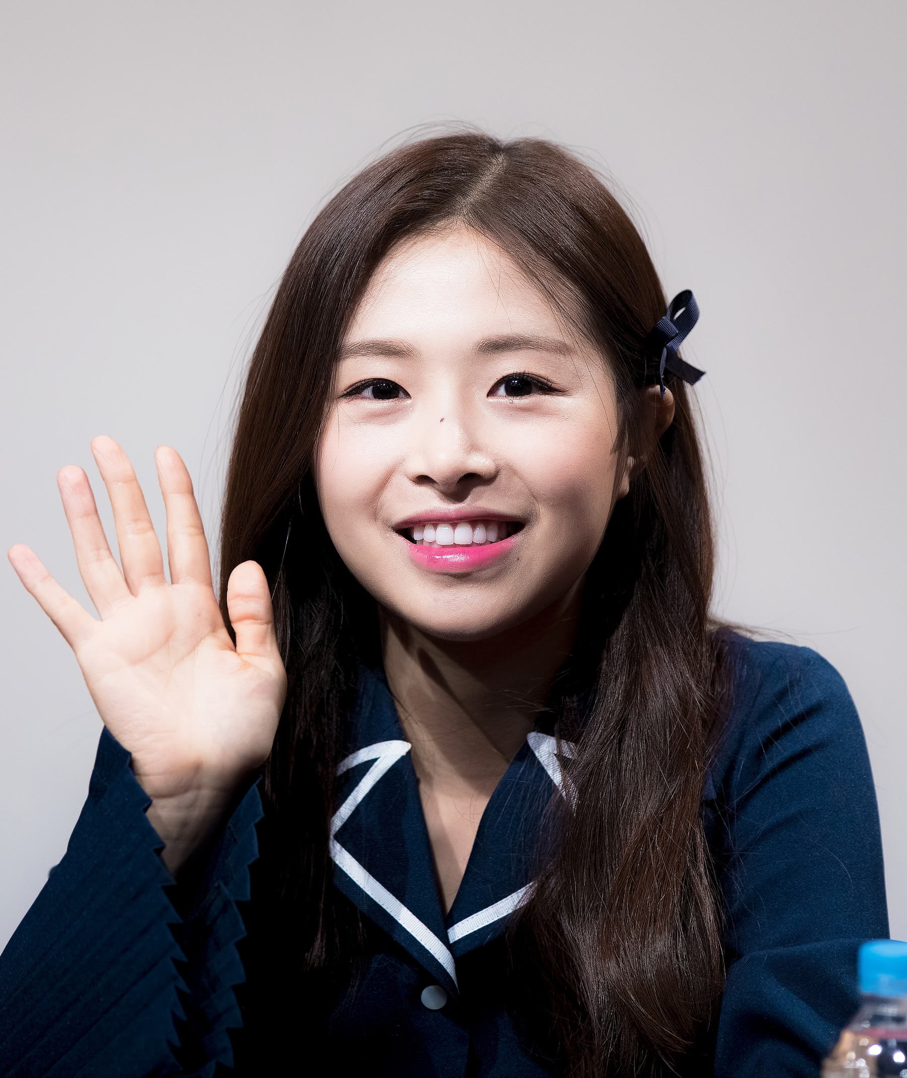 170122 중구 APRIL 팬싸인회 채원 8Pic